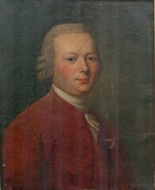 A Frerejean